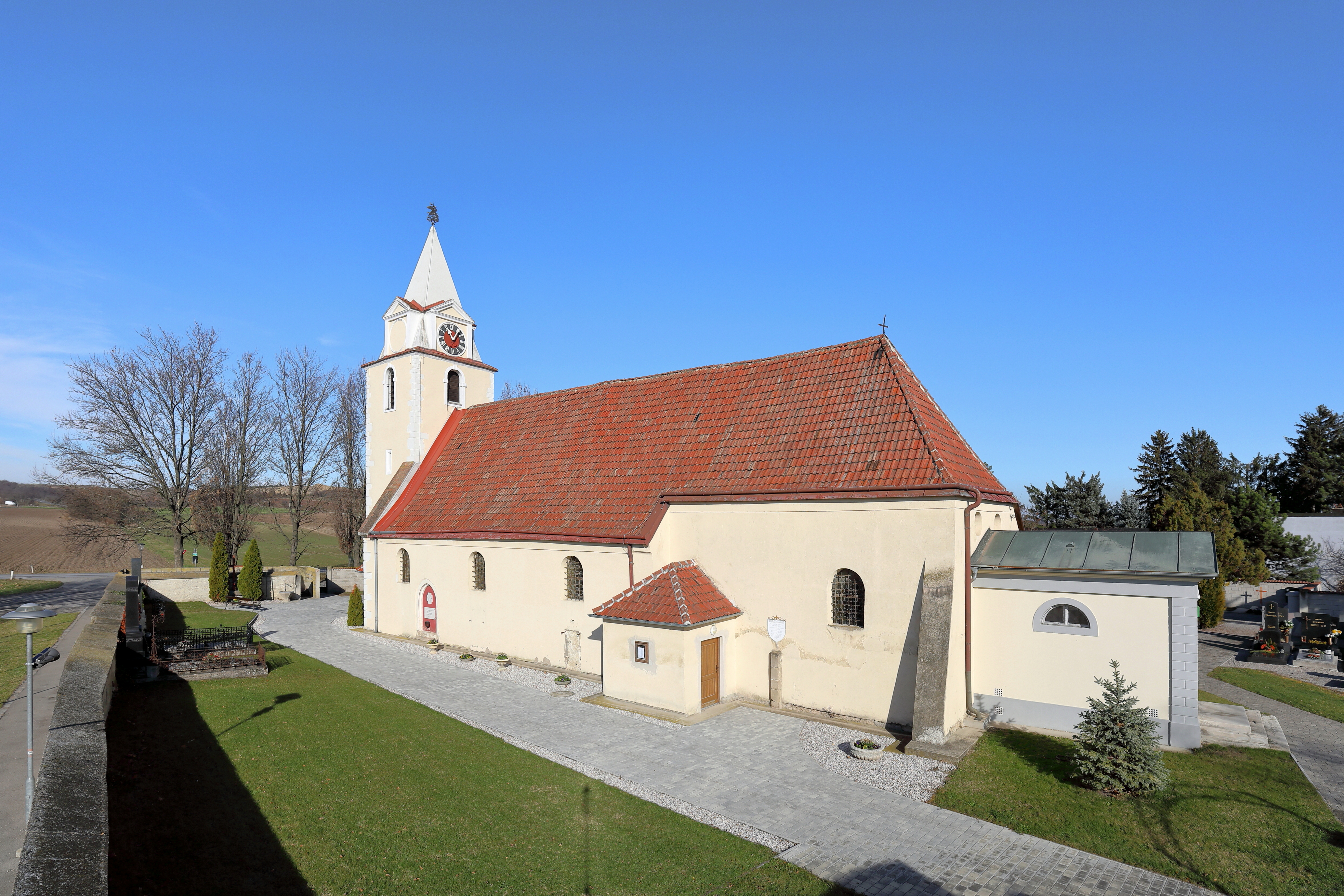 Südansicht der röm.-kath. Pfarrkirche hl. Georg in Wienerherberg, ein Ortsteil der niederösterreichischen Gemeinde Ebergassing.Eine gotische Wehrkirche aus dem 14./15. Jahrhundert, die teilweise von einer Bruchsteinmauer umgeben ist. Die Kirche ist innen barockisiert und 1727/28 wurde nordostseitig ein Seitenschiff angebaut. Südöstlich der Kirche, direkt an den Chor angebaut, befindet sich das 1804 errichtete Mausoleum für Johann Thomas von Trattner.